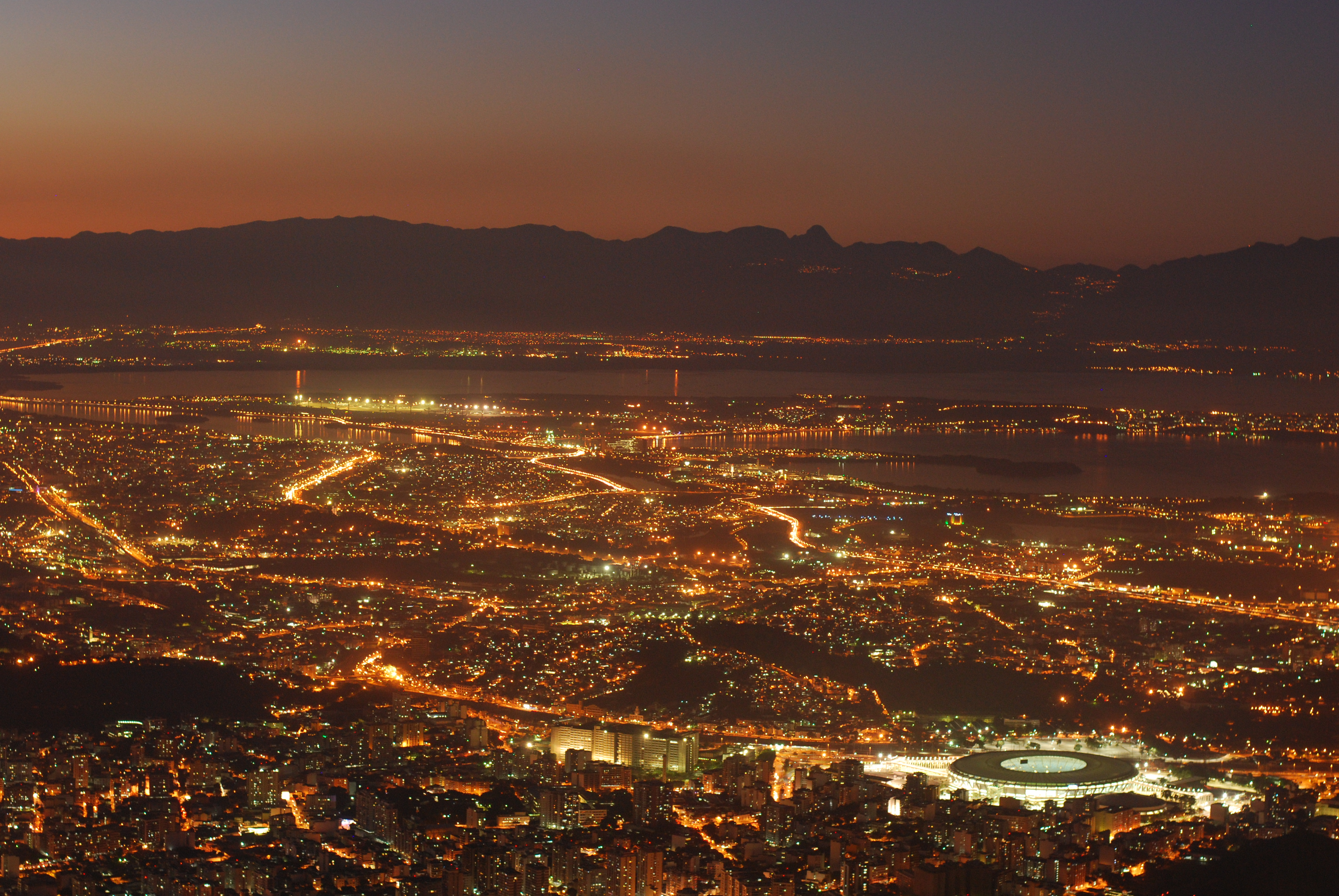 Visão extraordinária da cidade do Rio de Janeiro